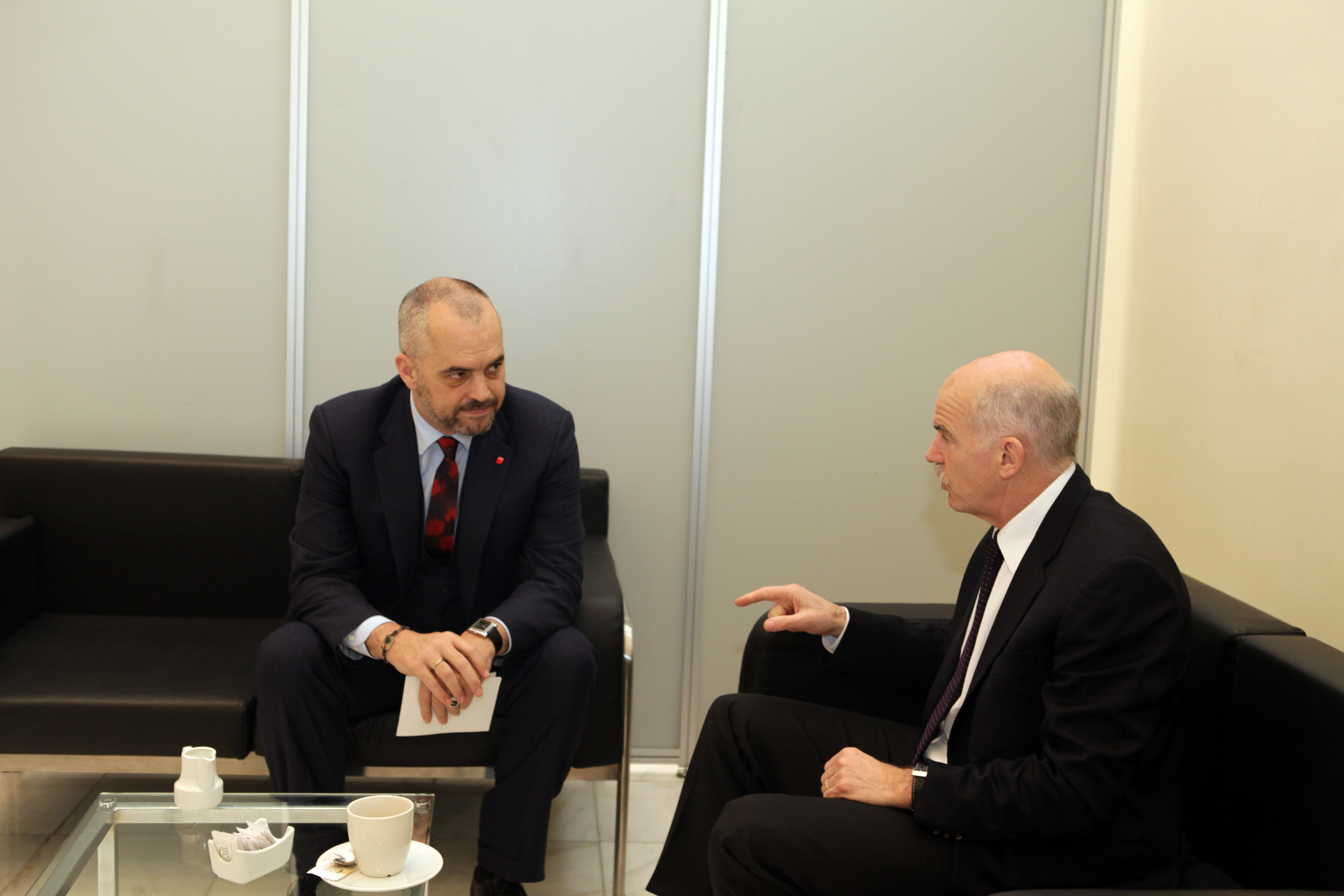 Edi Rama Ζάππειο Μέγαρο 5 Μαρτίου, 2011